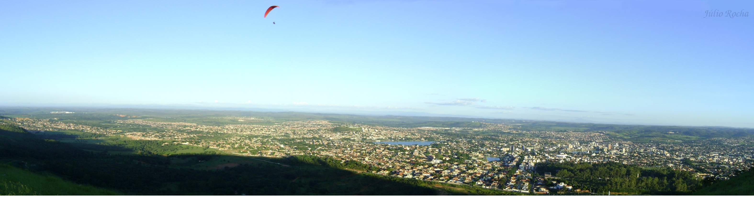 Foto panorâmica da cidade de Sete Lagoas em Minas Gerais tirada da serra de Santa Helena em 02/01/2010.